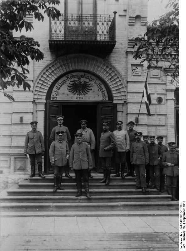 Brest Litowsk. Die Etappenkommandantur. Phot. W. Braemer Aufgen.: Sept. 1915